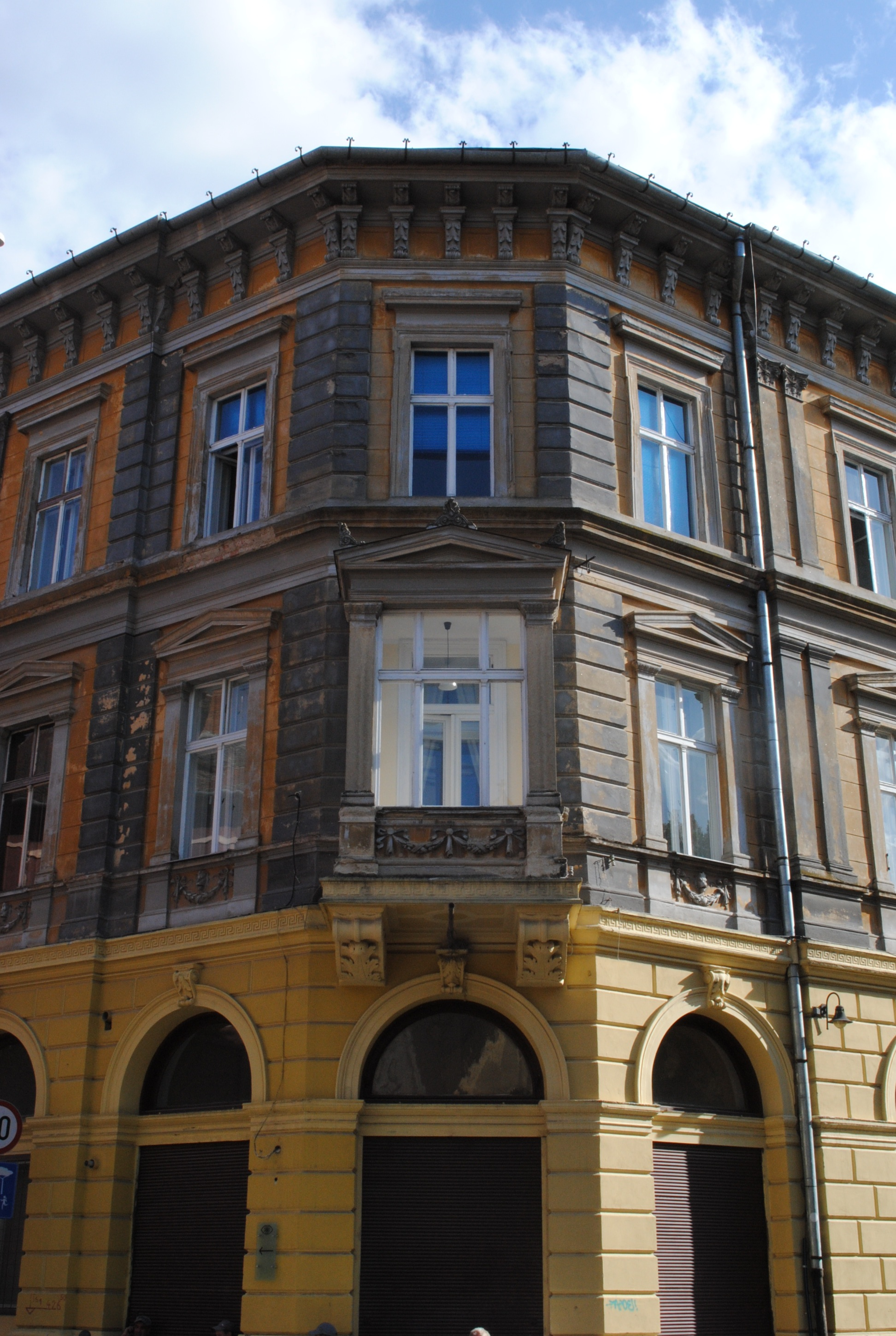 Casă (locuință de raport), 1901 - 1910